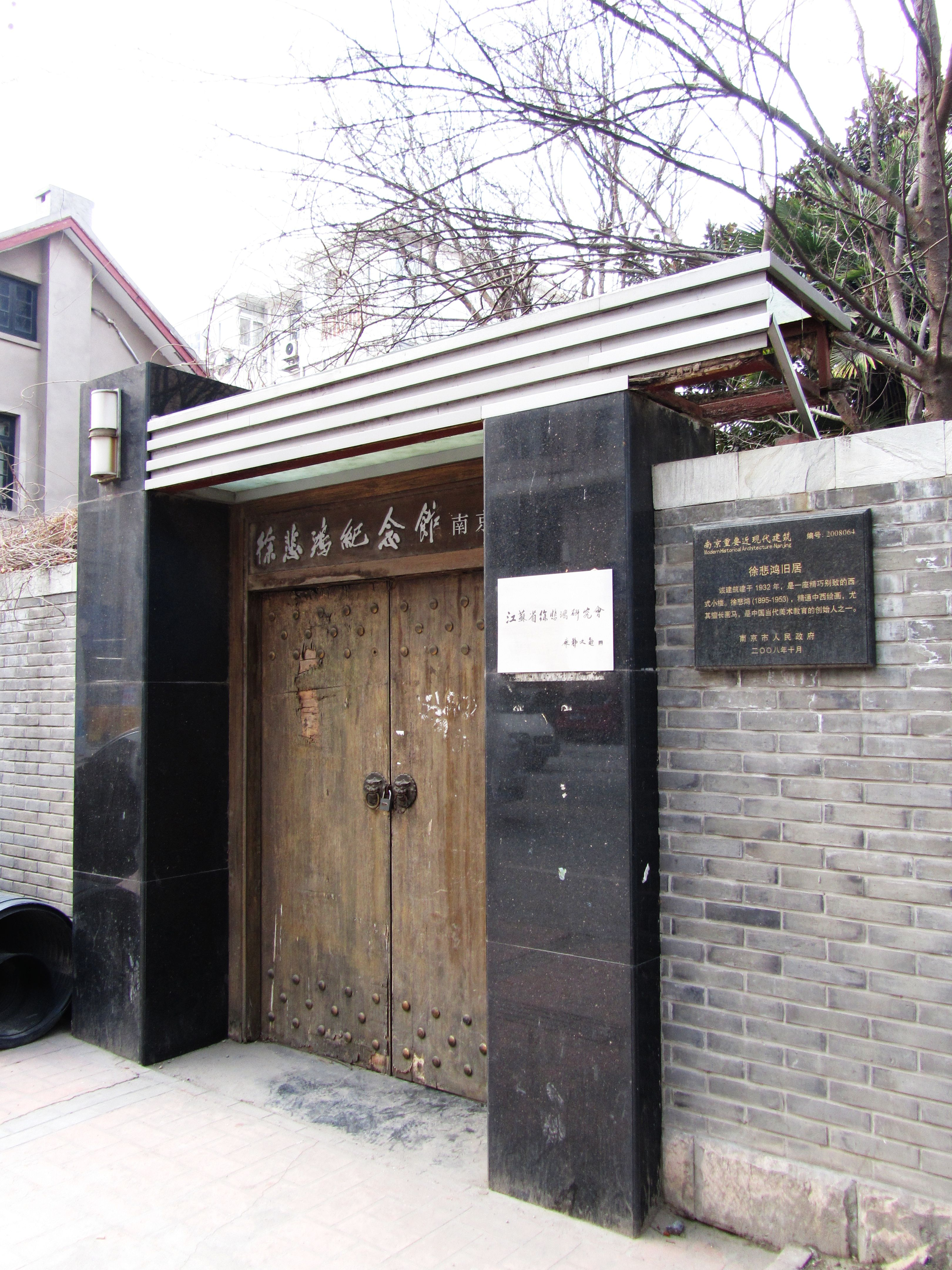 南京傅后岗4号徐悲鸿故居。